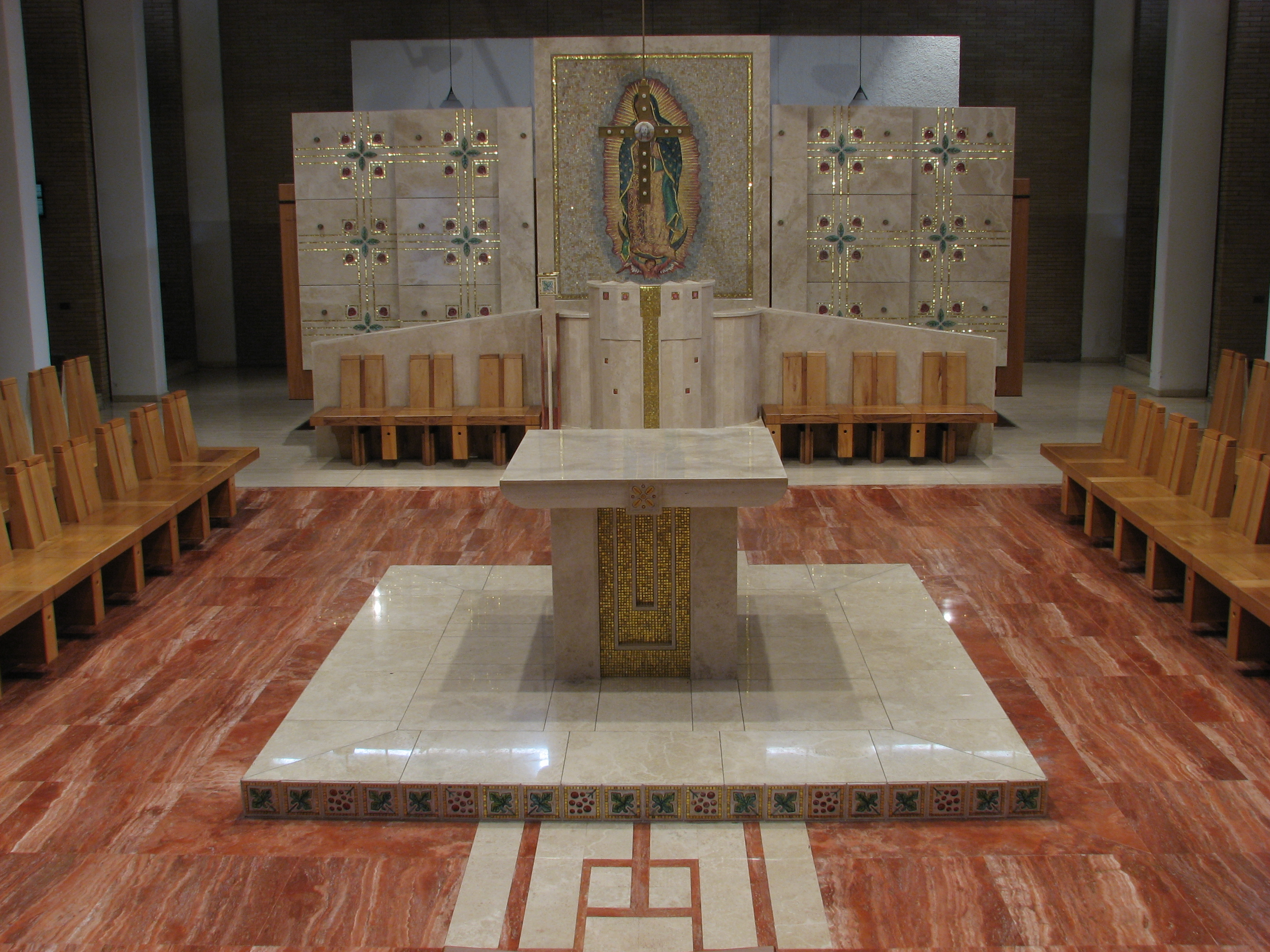 Interior de la Capilla del Colegio. Altar Mayor.